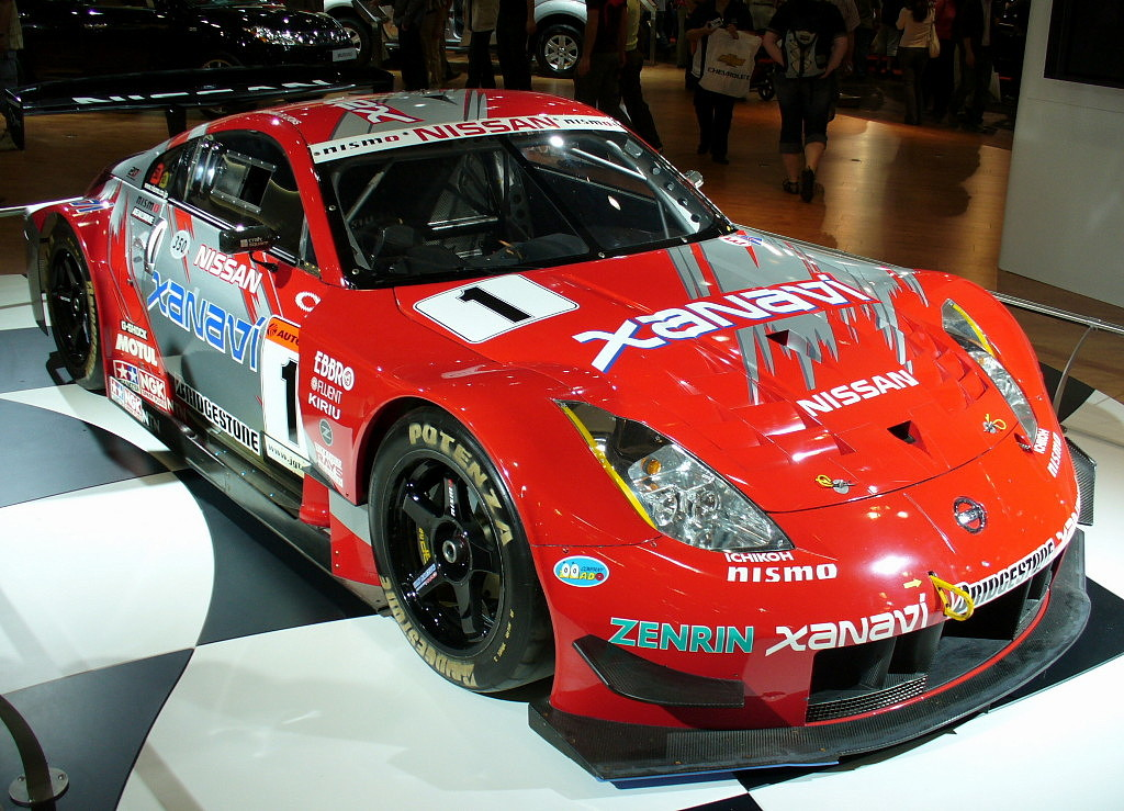 Nissan 350Z GTR